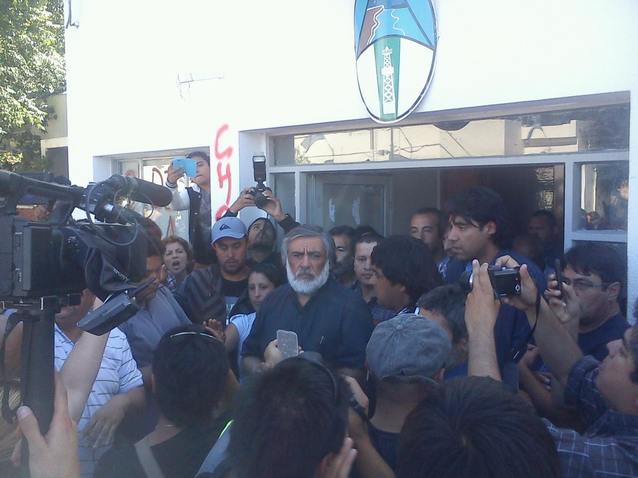 Situacion de la escasez de agua